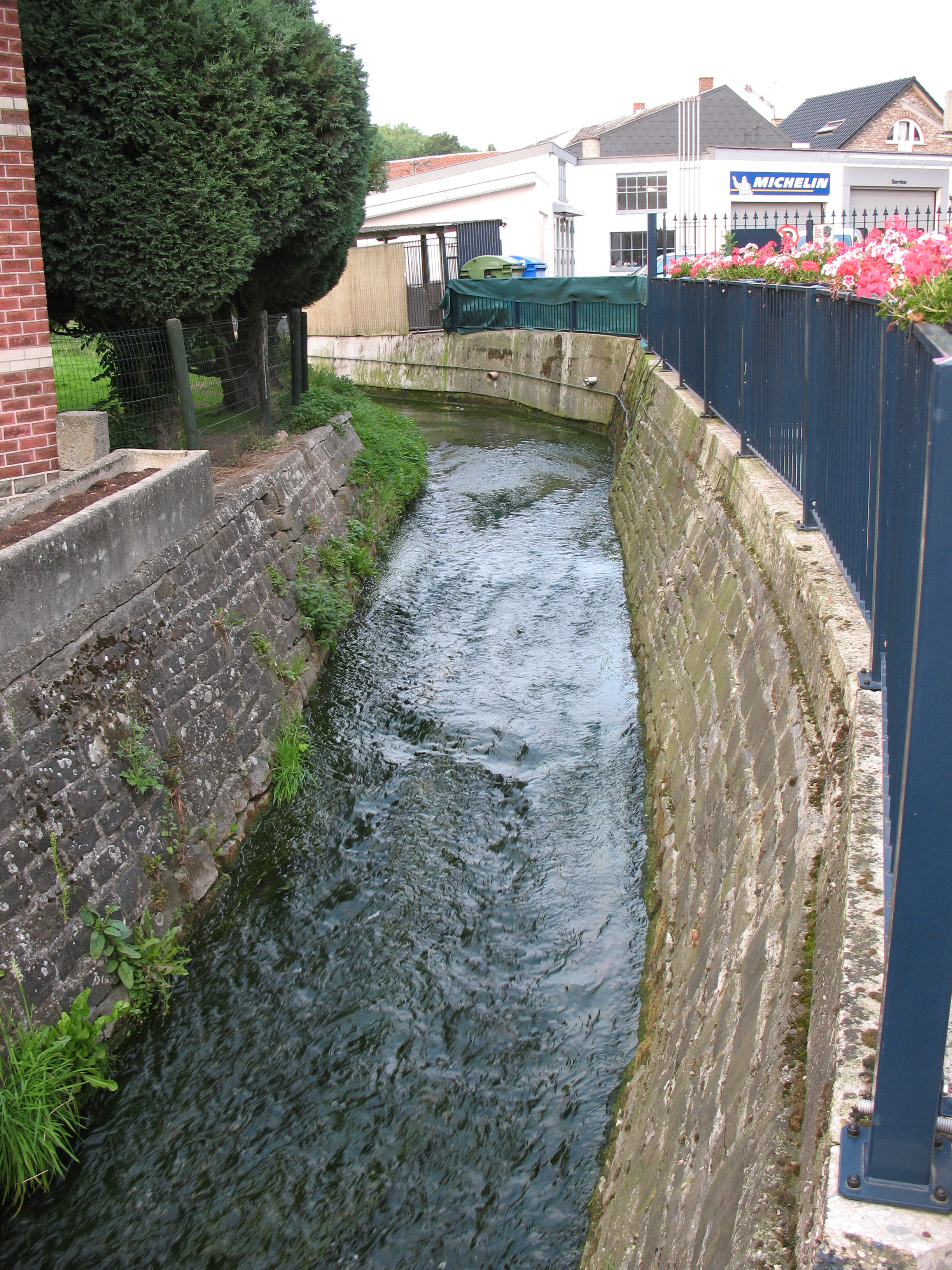 Foto gemaakt in 's Gravenvoeren